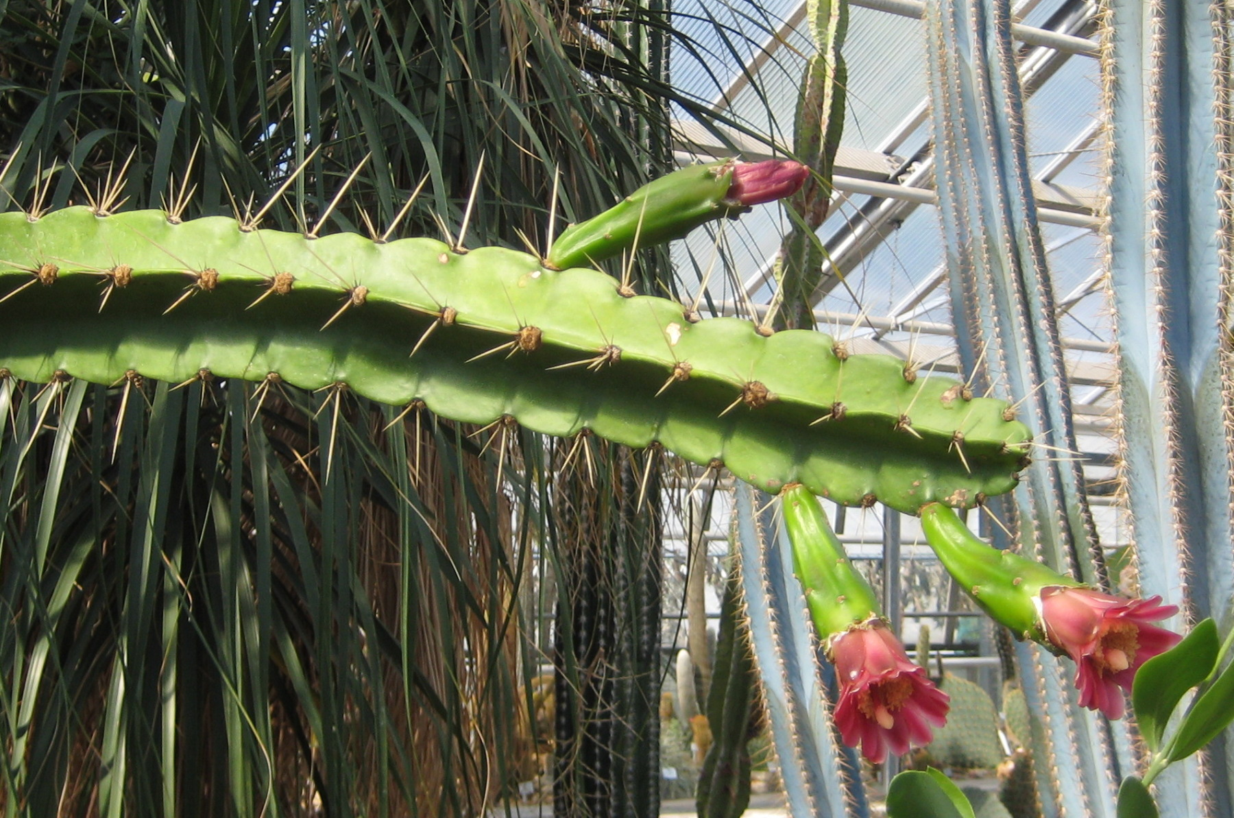 Calymmanthium substerile im Botanischen Garten Dresden